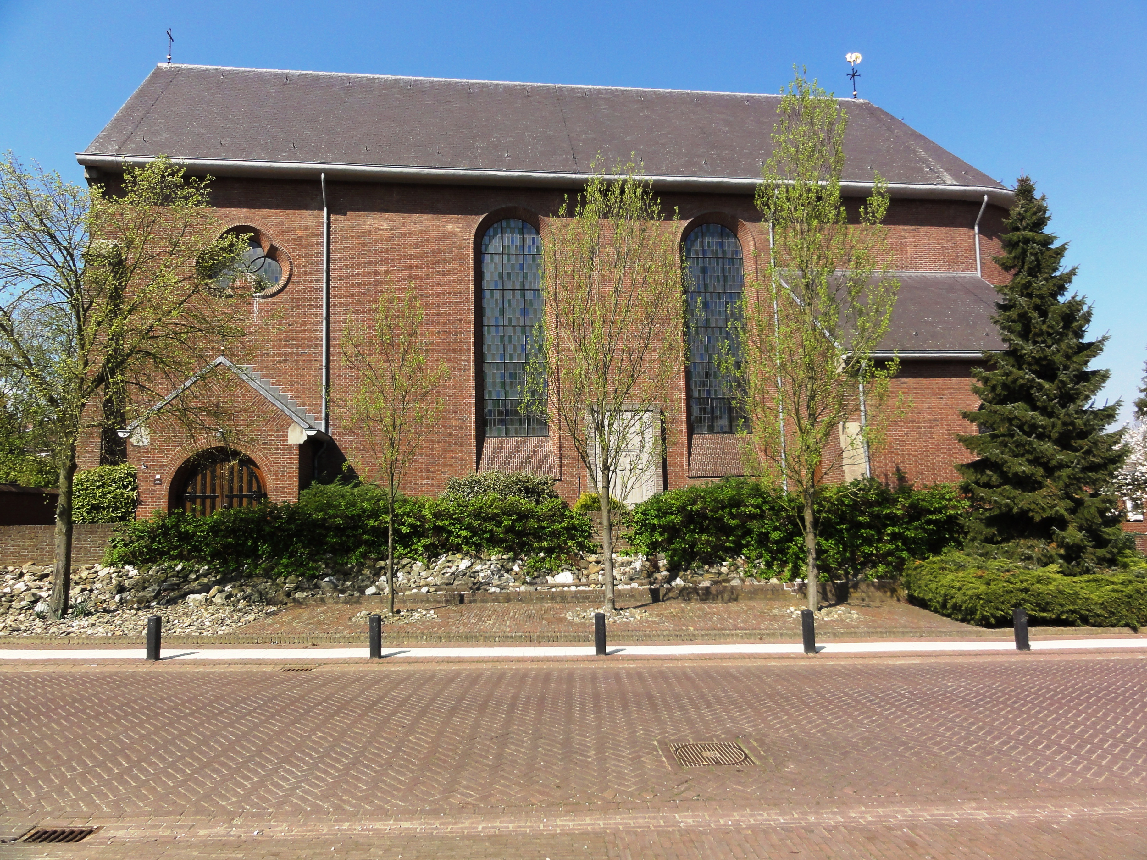 Venray Geijsteren, St.Willibrorduskerk